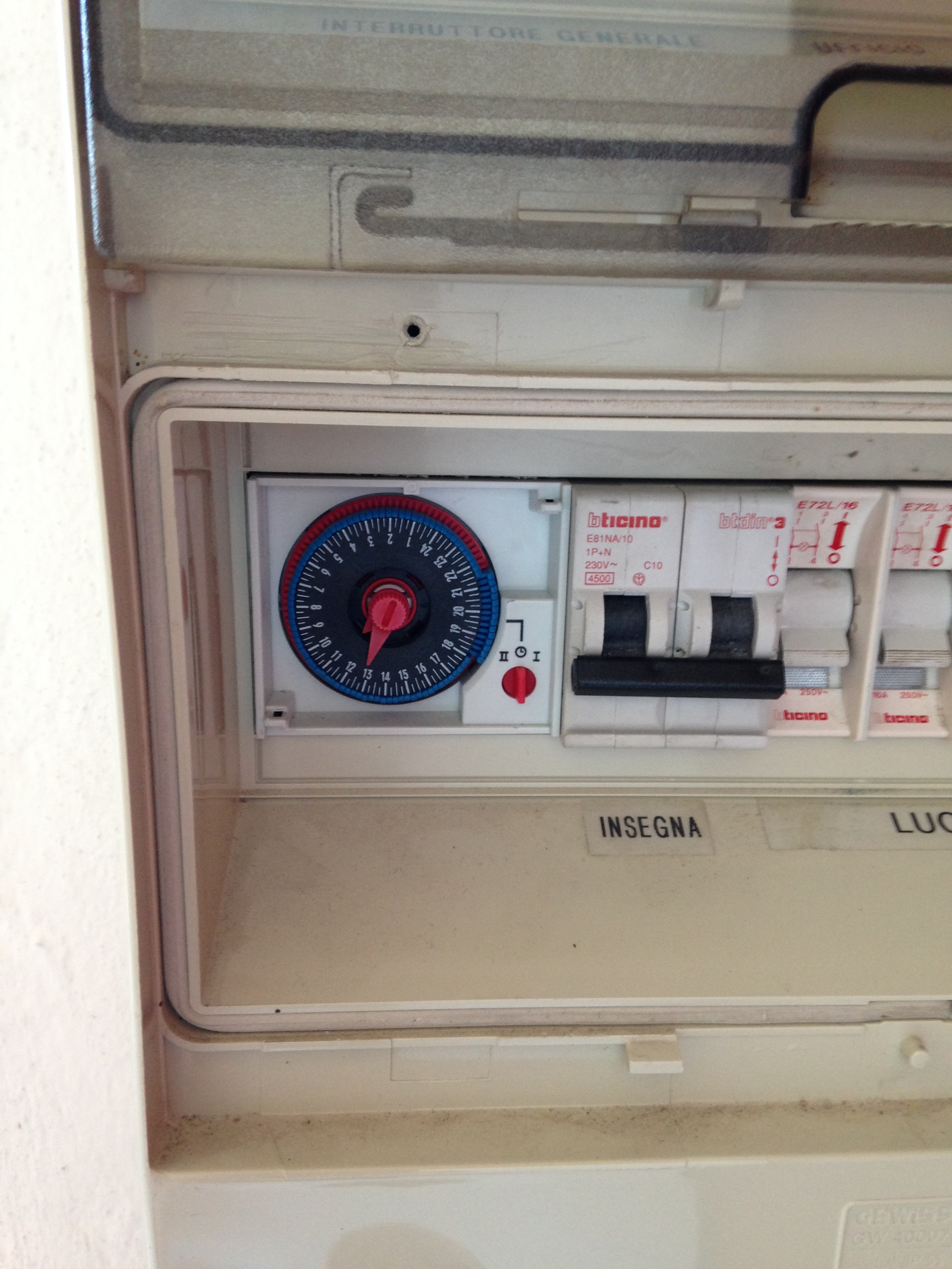 Timer elettromeccanico Legrand per quadro elettrico.